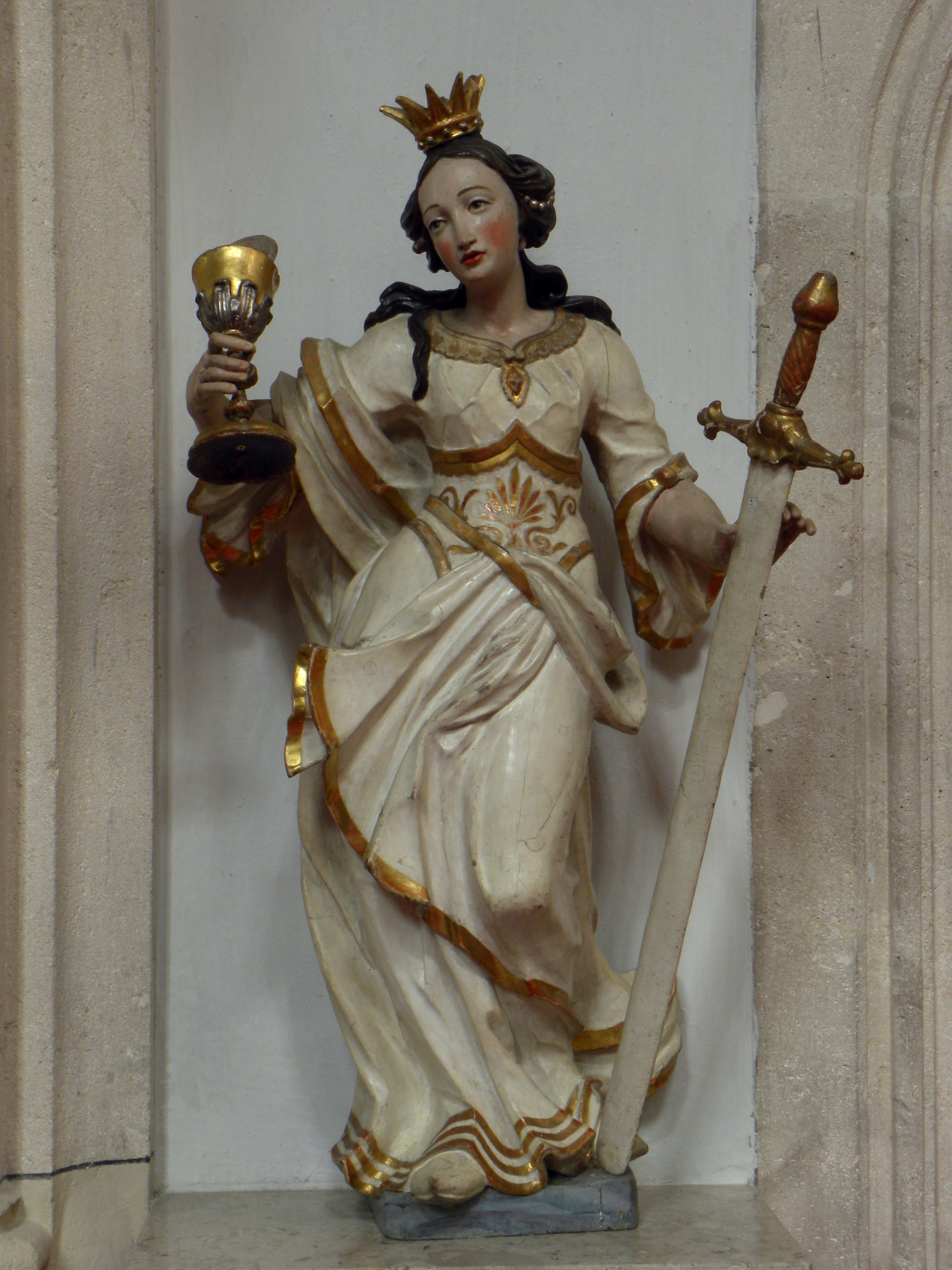 Kirchenfestungsanlage hl. Oswald mit Johanneskapelle und Kapellenbildstock - am linken Seitenaltar stehende Statue der hl. Barbara aus dem 18. Jahrhundert